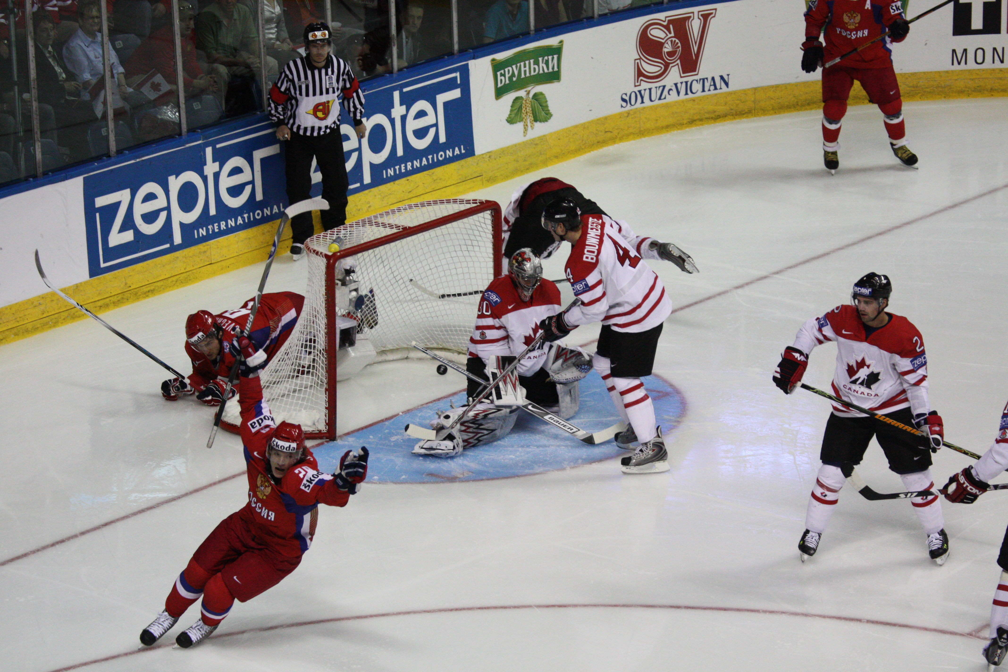 Александр Семин забивает первый гол в финале Чемпионата мира 2008